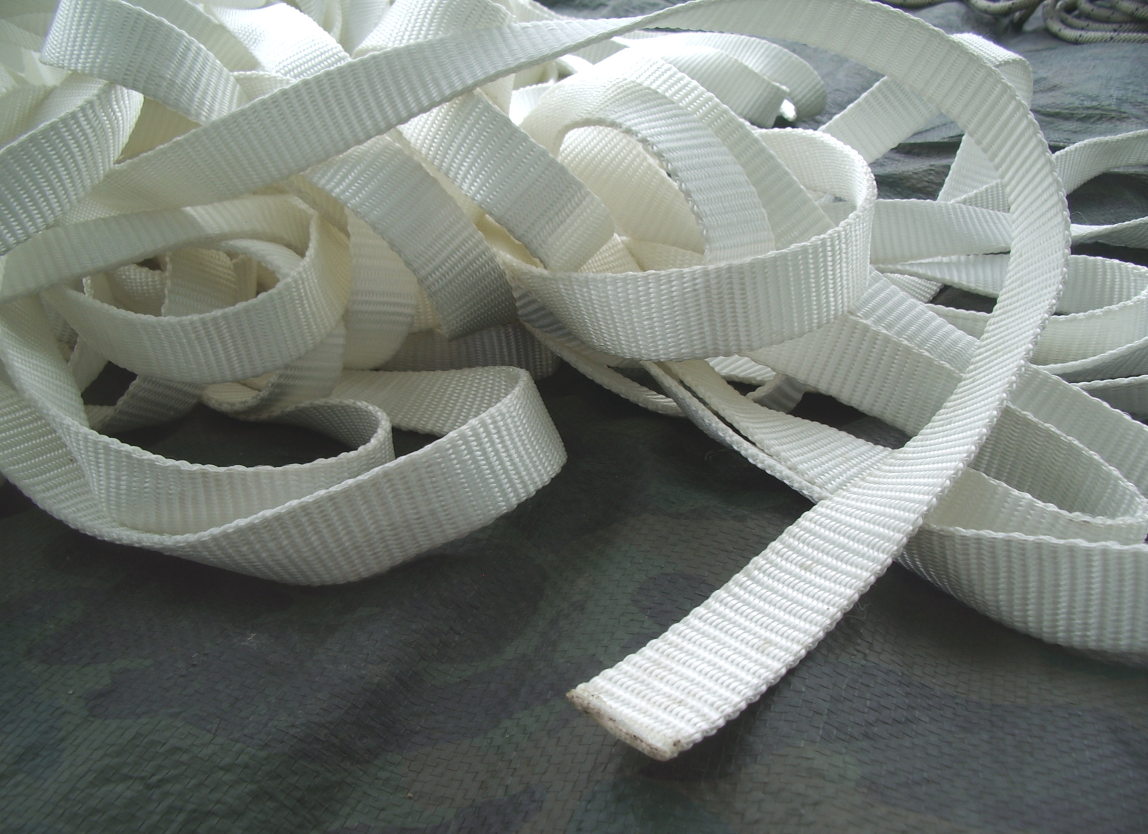 Détail d'une slackline de type Maverick (marque Slack.fr)